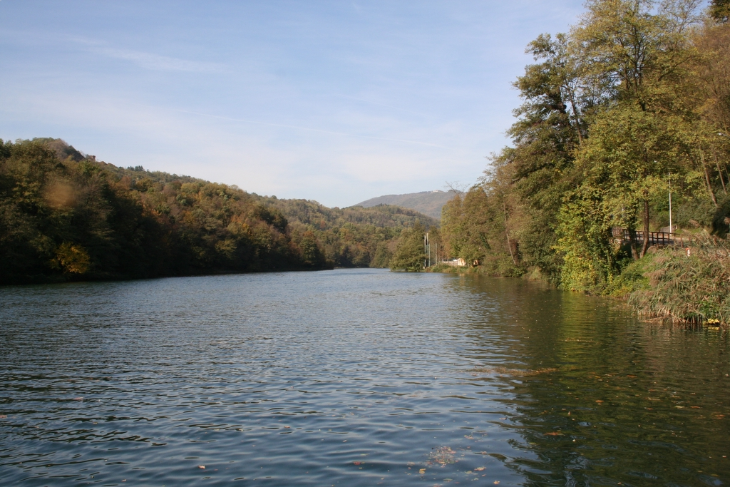 Autore Giorces. Adda fra Villa d'Adda e Imbersago.